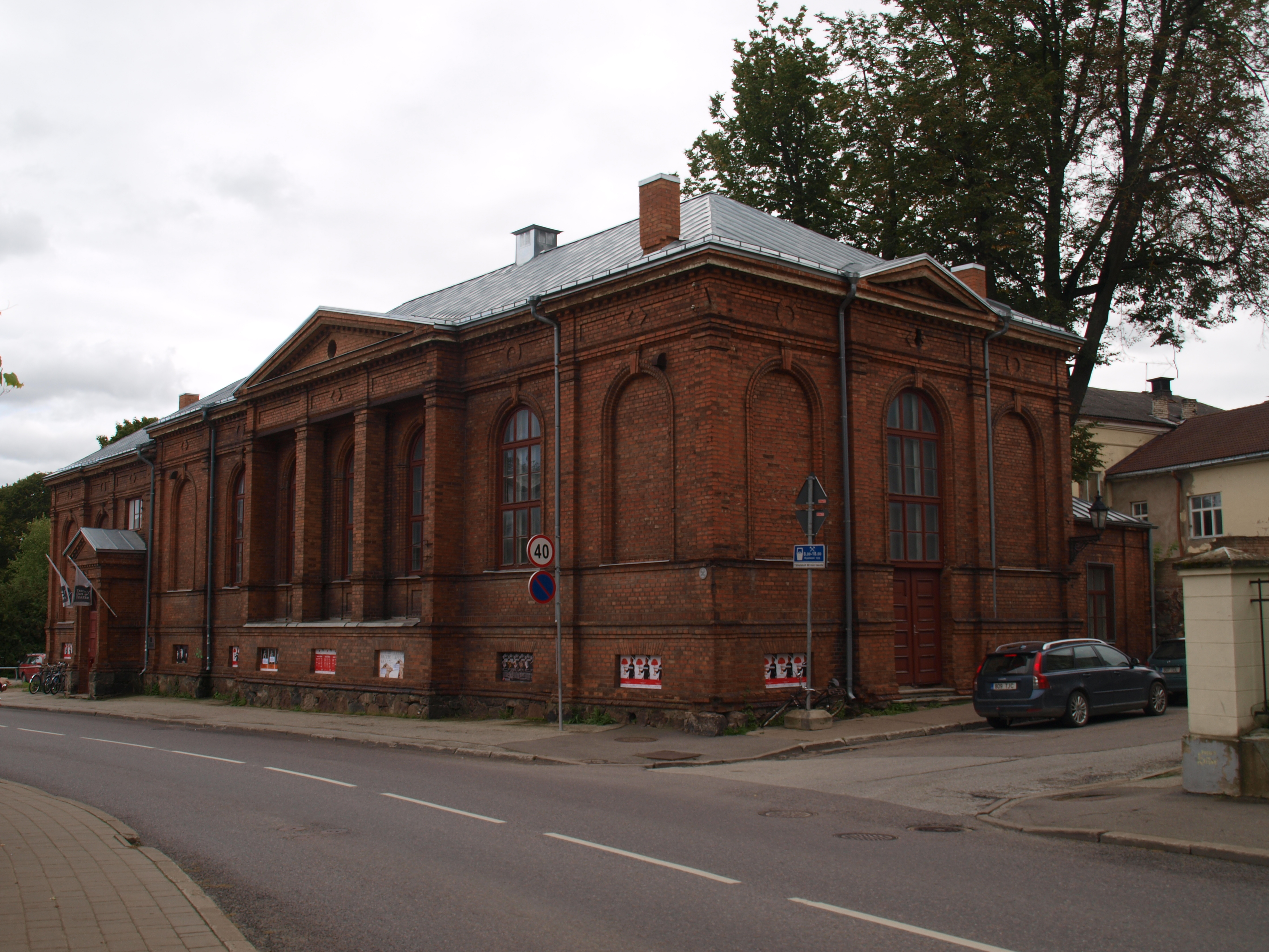 Võimlahoone Tartus Lai 37, 1890.a. Hetkel asub hoones Tartu Uus Teater.